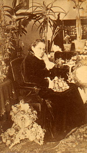 Altersbildnis von Mathilde Franziska Anneke (1817–1884)